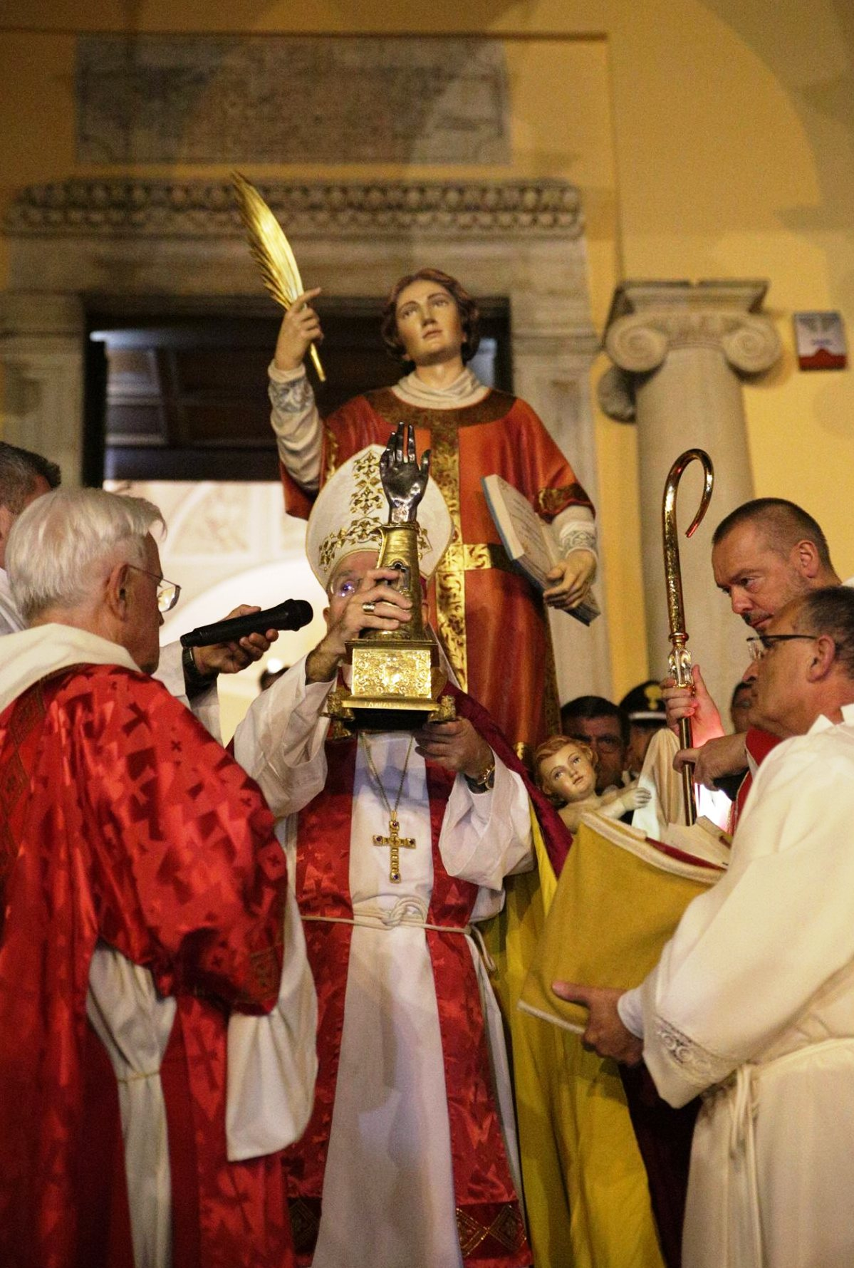 Il vescovo Mariano Crociata benedice i fedeli con il braccio reliquiario di San Cesareo, Cattedrale di San Cesareo di Terracina, 10 novembre 2018 (ph Andrea Longo)